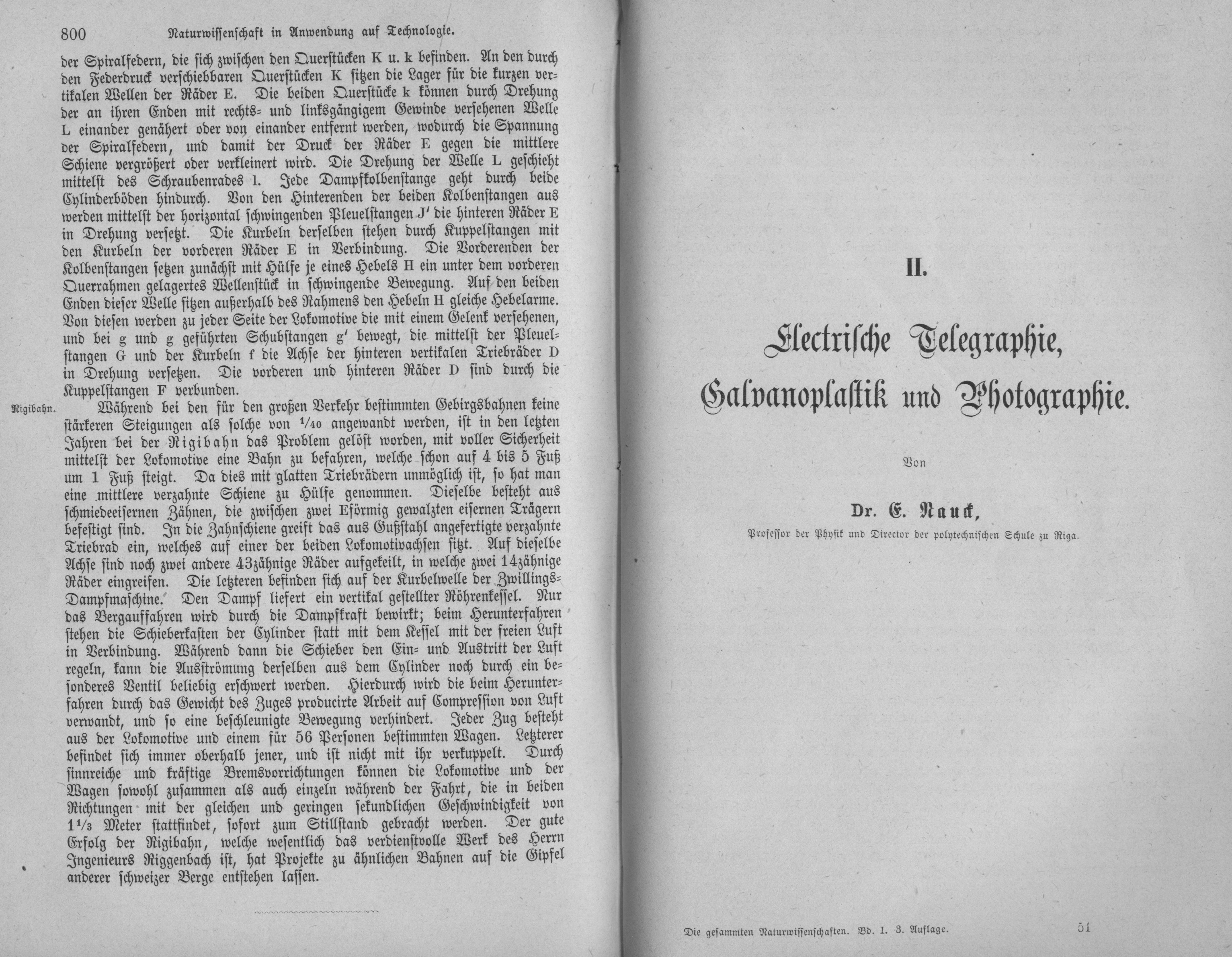 Seiten 800 und 801 des 1873 erschienen Buches „Die gesammten Naturwissenschaften“